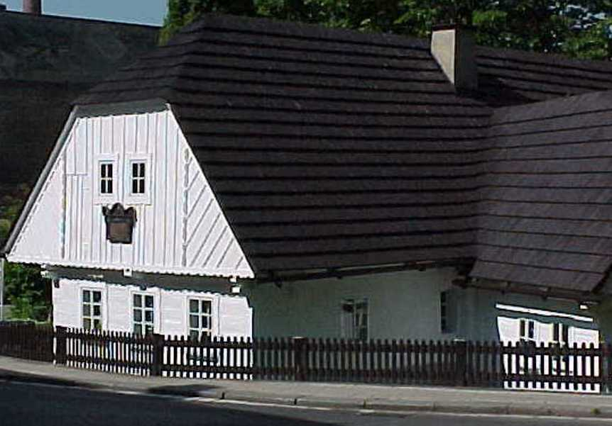 Geburtshaus des Schriftstellers Alois Jirasek in Hronov in Tschechien